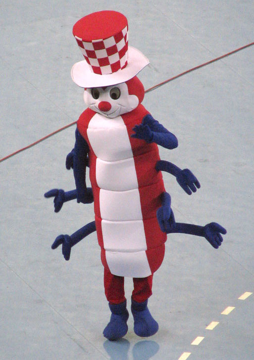 Maskota Svjetskog prvenstva u rukometu Hrvatska 2009.